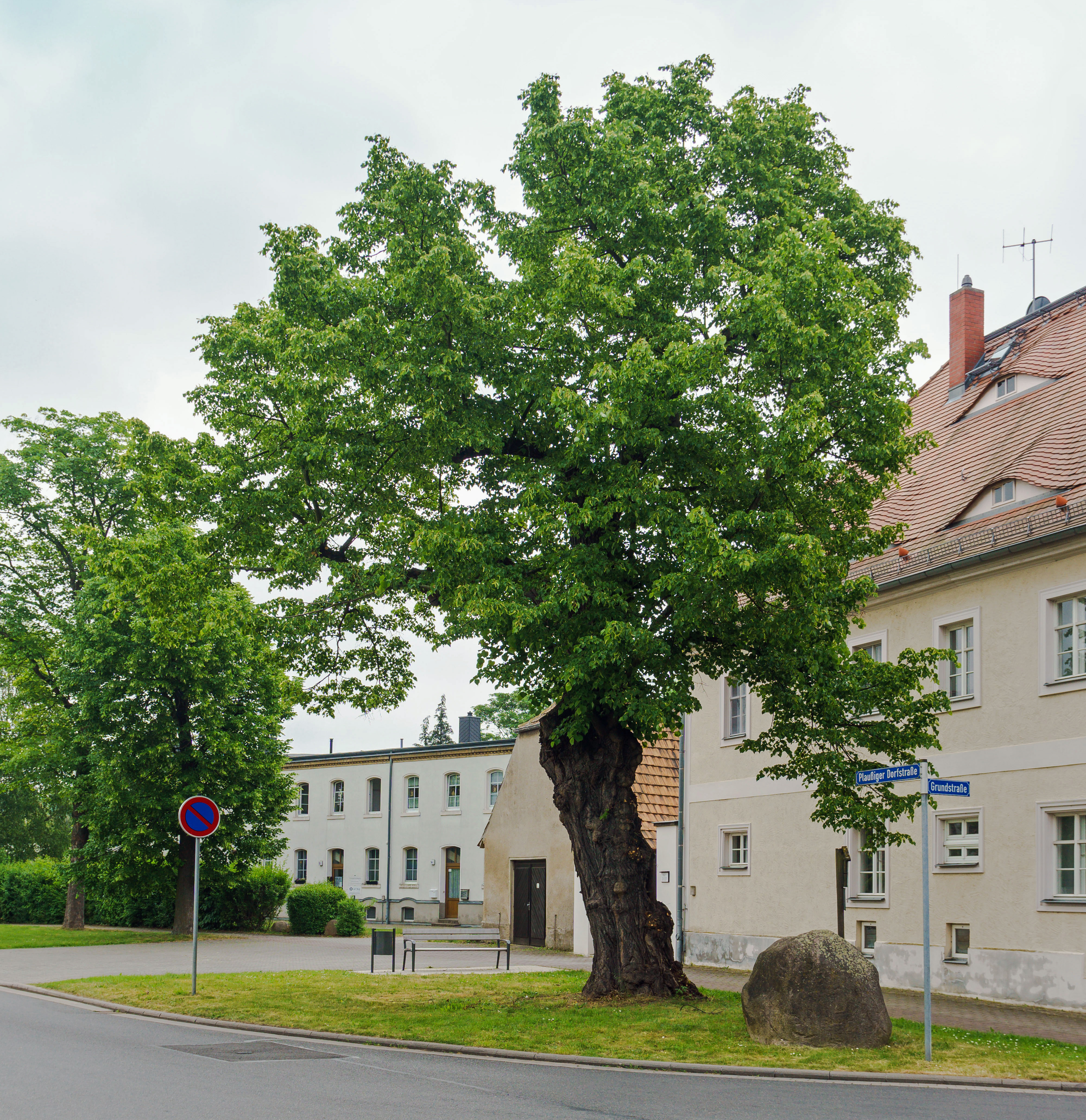 Steinlinde gepflanzt 1868, an der Plaußiger Dorfstraße (neben dem Pfarrhaus Grundstraße 18) in Leipzig-Plaußig